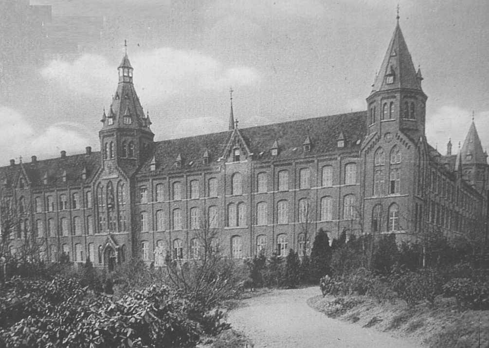 St. Ludwig Collage Vlodrop